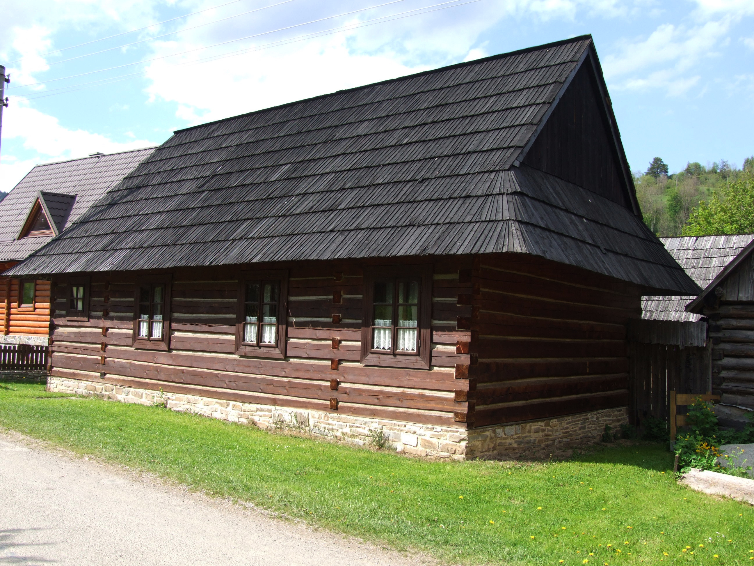 Osturňa